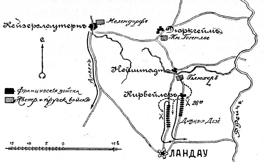 Это изображение было использовано для иллюстрирования статьи «Кирвейлер» опубликованной в двенадцатом томе «Военной энциклопедии», который был издан книгоиздательским товариществом И. Д. Сытина в 1913 году в столице Российской империи городе Санкт-Петербурге. Более подробное описание к этой картинке можно прочесть в указанной выше статье.